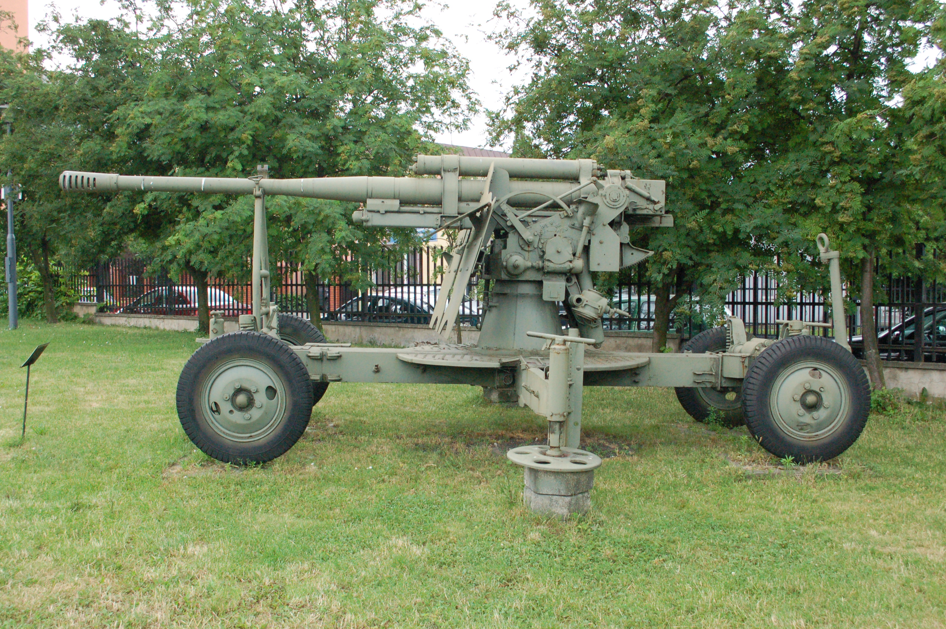 Sochaczew